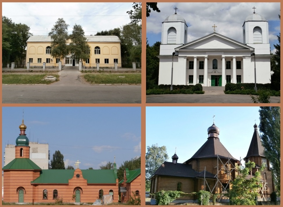 Collage Kirchengebäude in Schowti Wody